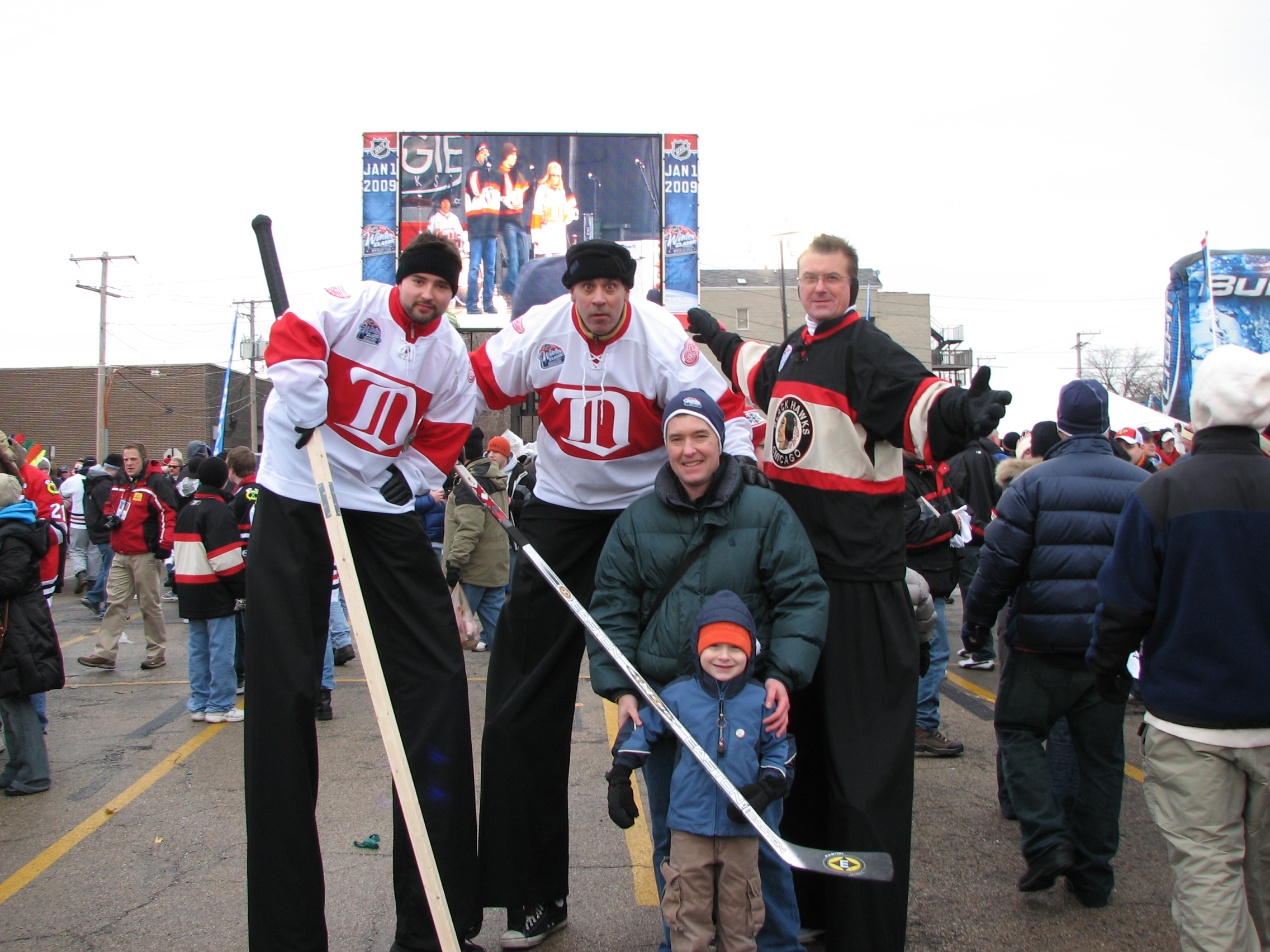 Stilt walker dudes + Jay + Jack